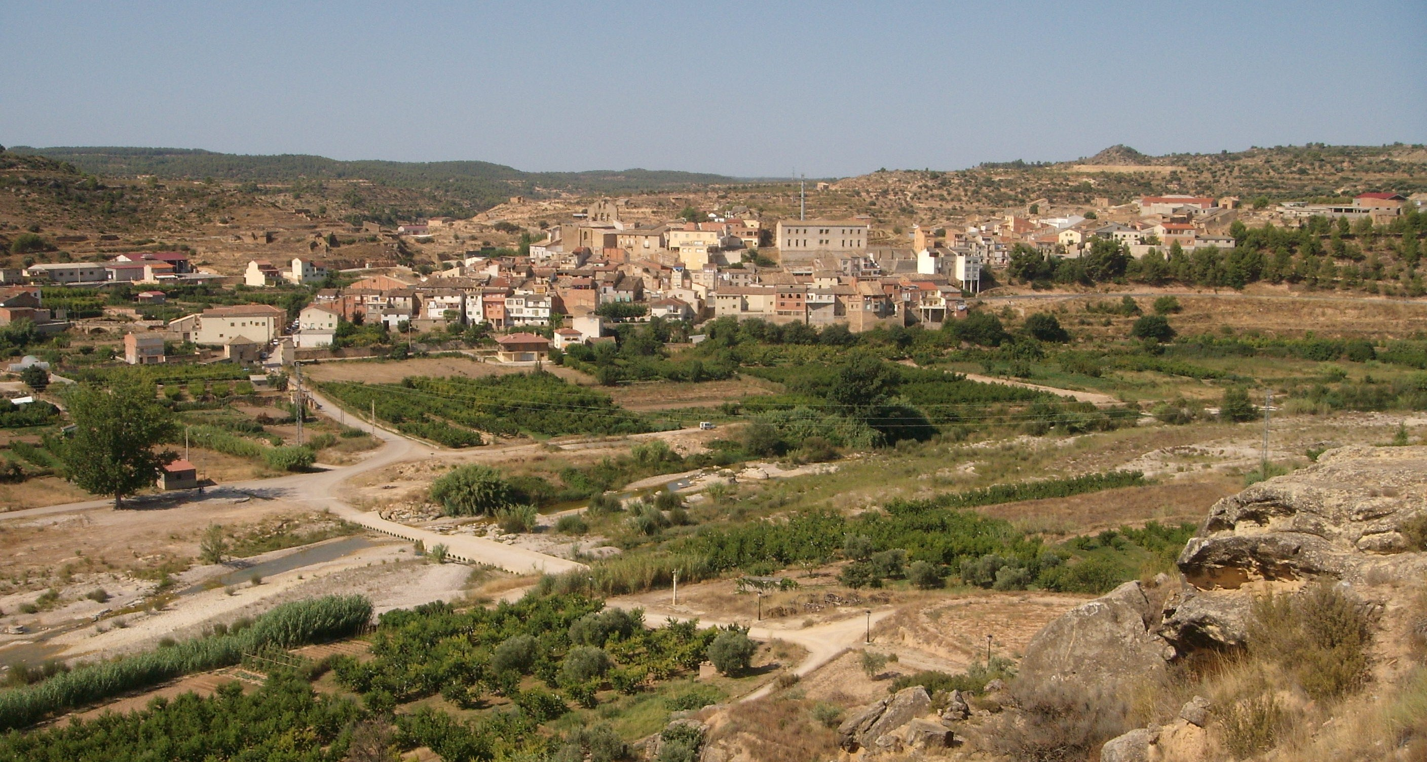 Vista general de Mazaleón